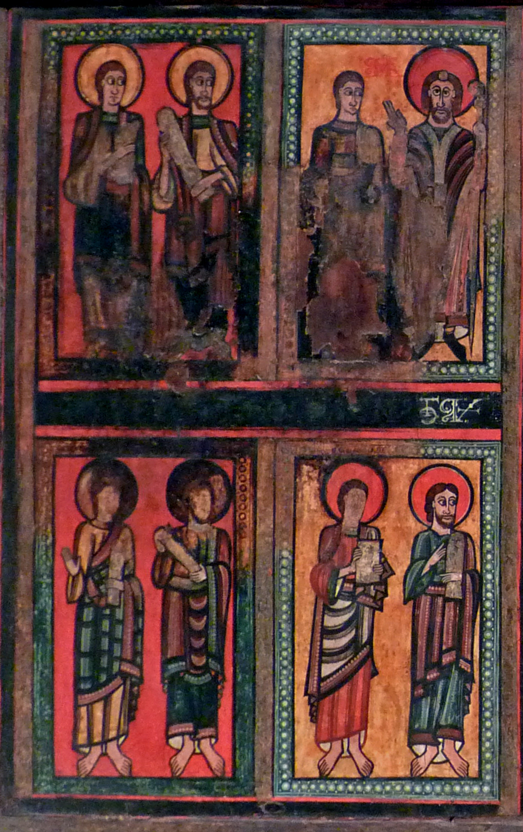 Detall del Frontal de altar d'Ix procedent de La Guingueta d'Ix (Alta Cerdanya) conservat en el Museu Nacional d'Art de Catalunya (Barcelona) Siglo XII From the romanesque collections of the National Art Museum of Catalonia, inventory number: (official description)The item in the museum is in the public domain as described below. The copyright status of the photograph of the item is indicated separately. This work is in the public domain in its country of origin and other countries and areas where the copyright term is the author's life plus 100 years or less. You must also include a United States public domain tag to indicate why this work is in the public domain in the United States. This file has been identified as being free of known restrictions under copyright law, including all related and neighboring rights.